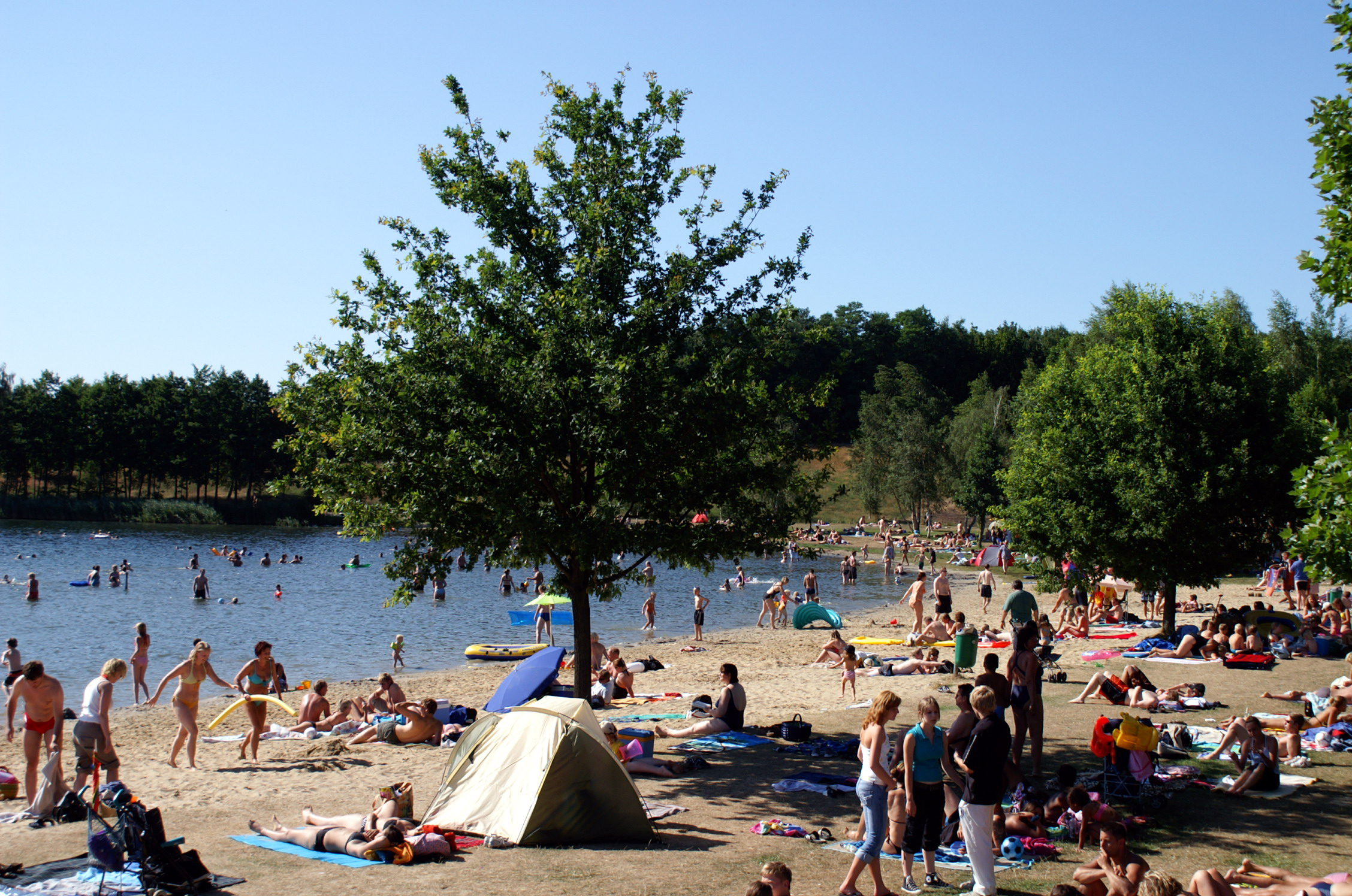 Sommer am Badestand der Alfsee-StandArena im Jahr 2006